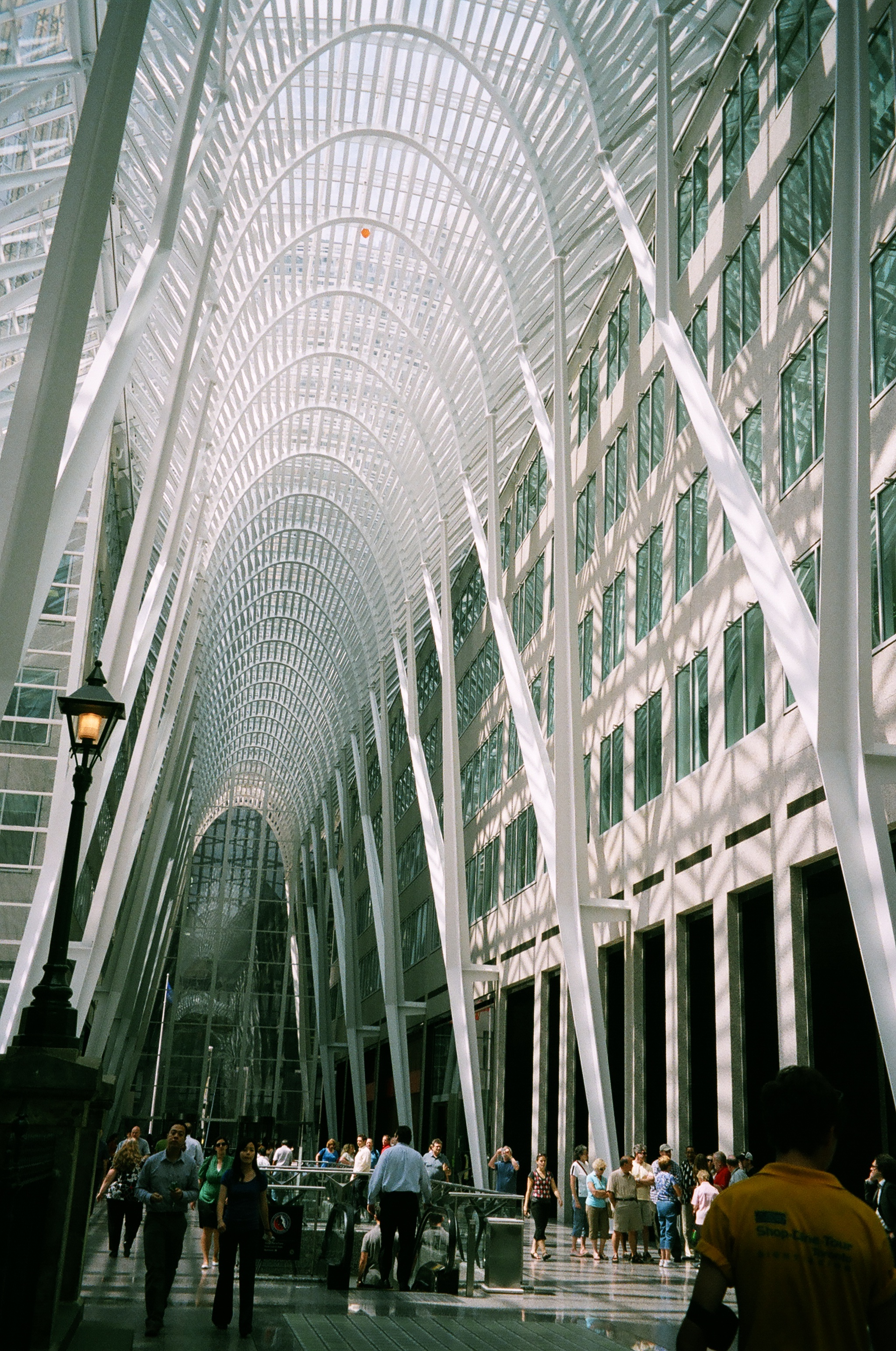 Plaça Brookfield a Toronto (Canadà): Arcades per recollir a l'hivern la població del molt fred que fa en aquesta ciutat